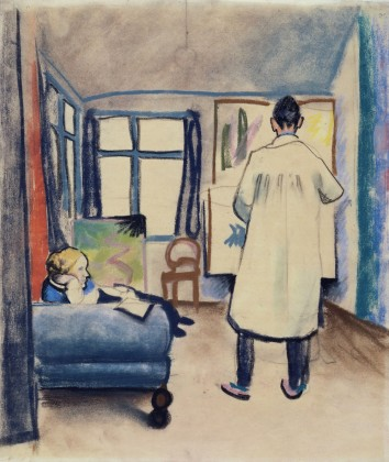 Franz Marc und Maria im Atelier, Pastell, Lenbachhaus, München